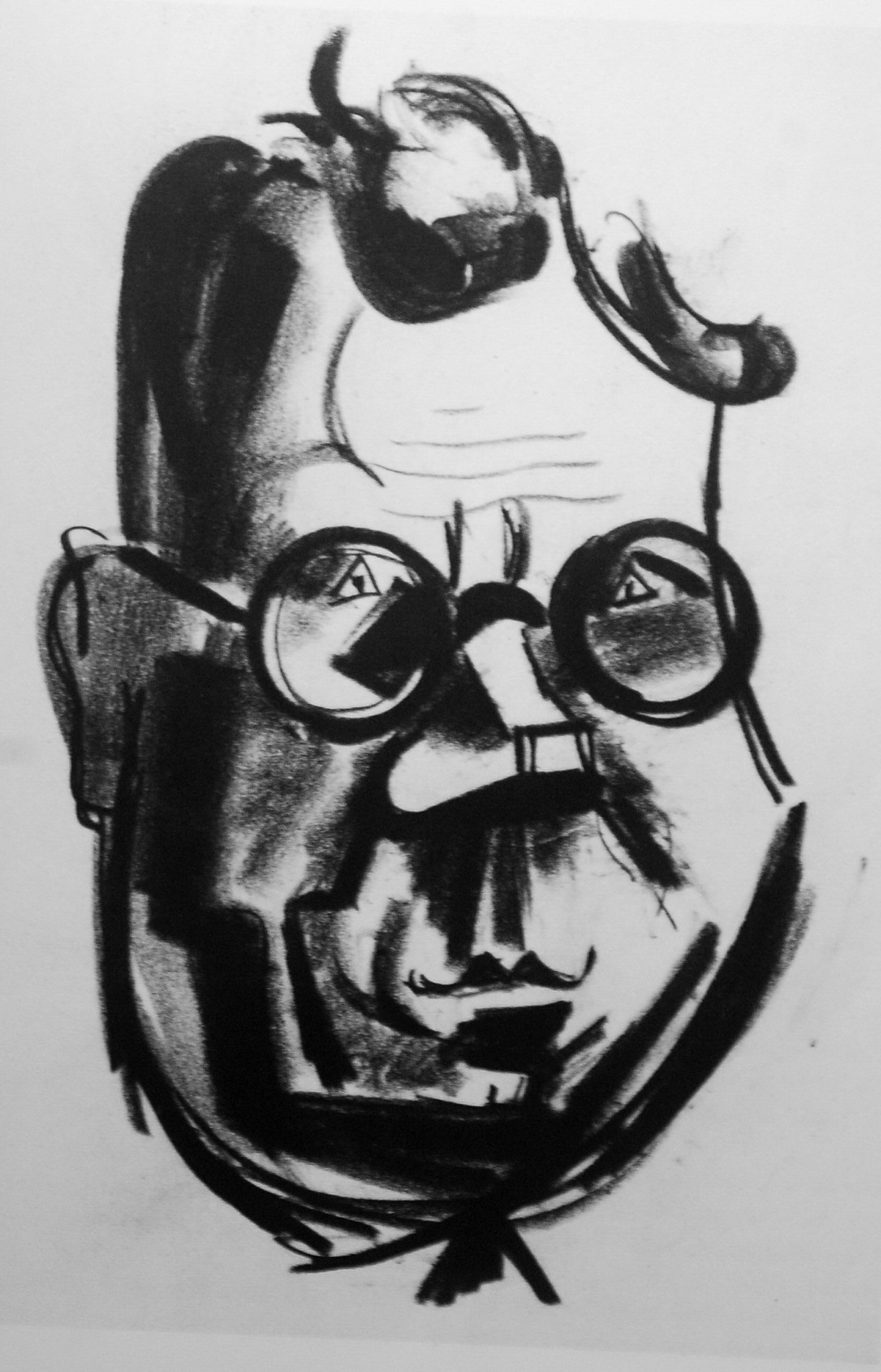 Rikard Lindström. Karikatyrteckning av konstnärsvänner utförd av konstnären John Jon-And, utgiven postumt efter hans död 1941 i boken Konstnärer Gebers Förlag.